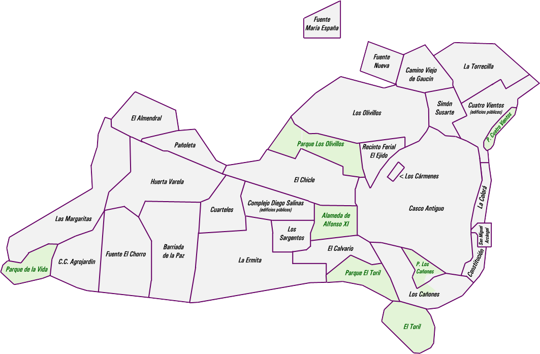 Principales barrios, calles, edificios y parques del casco urbano de San Roque.